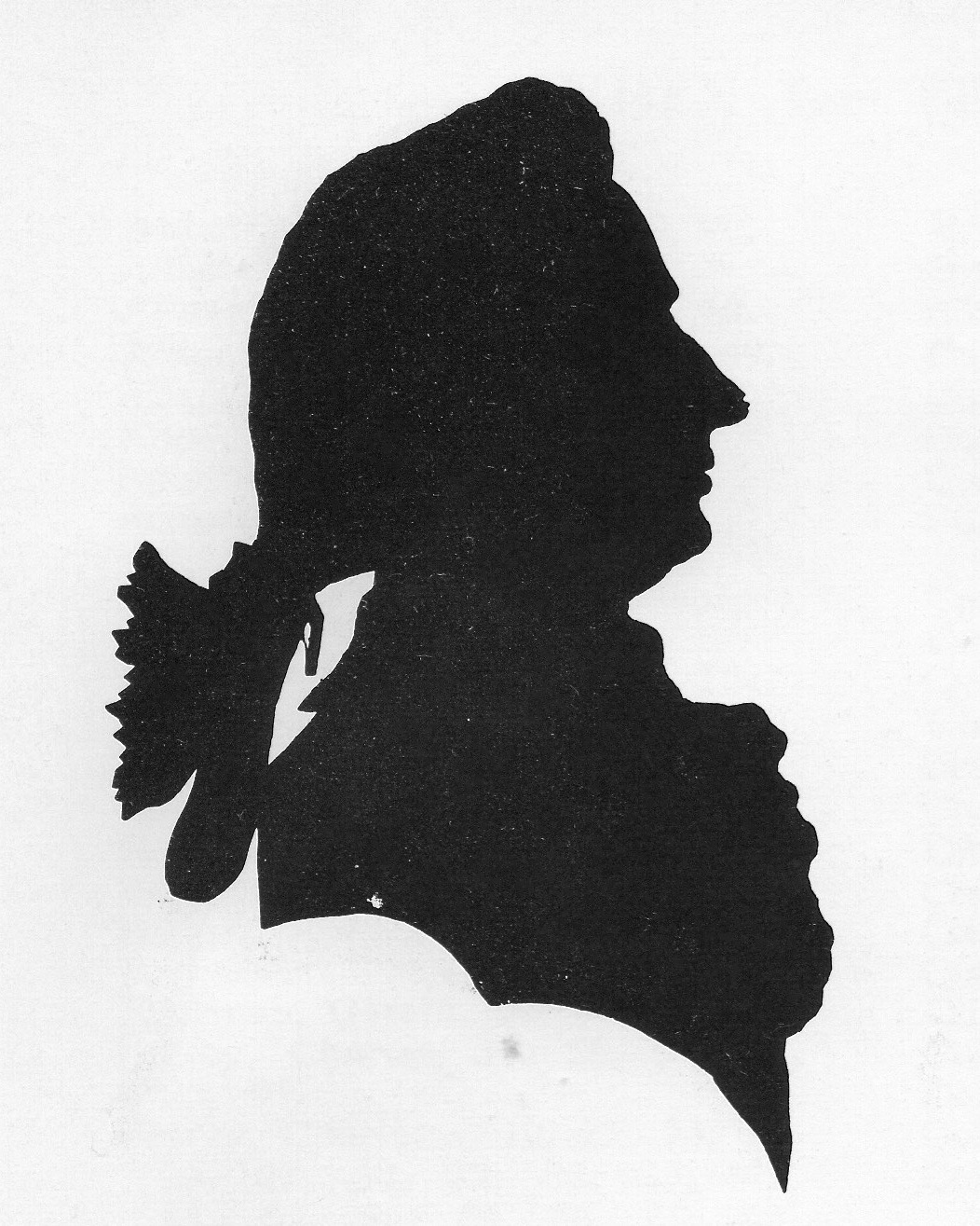 Bernhard Albrecht Moll (1743–1788): Der Wiener Künstler Carl Schütz (1745–1800). Royal Ontario Museum, Toronto.